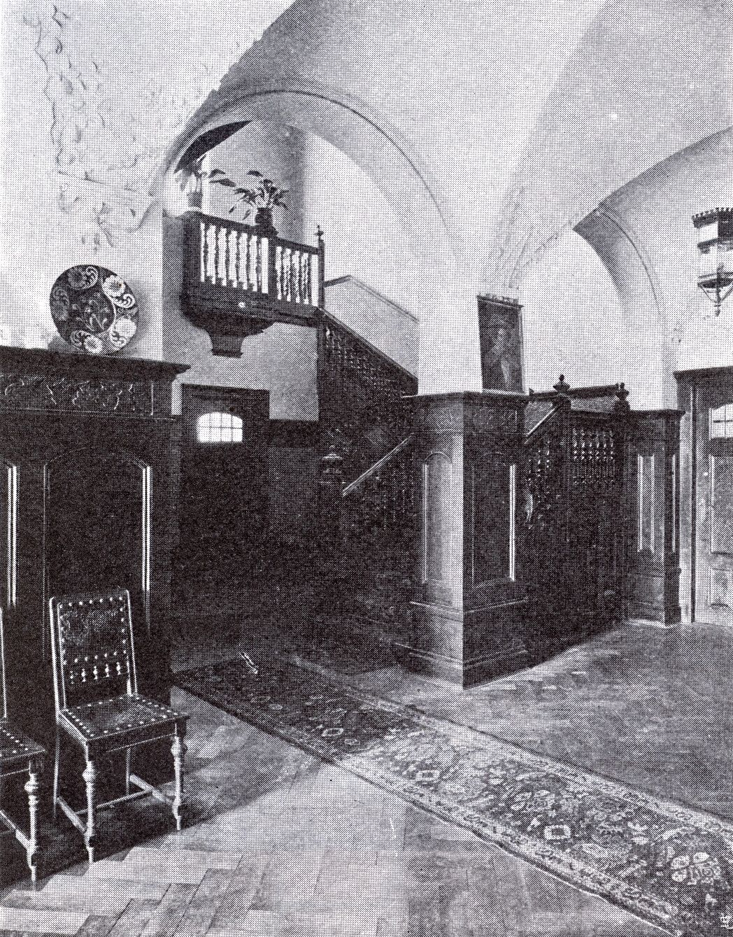 Haus Sack am Grafenberger Wald an der Straße nach Rath in Düsseldorf, erbaut vor 1904, Architekt Thilo Schneider.jpg